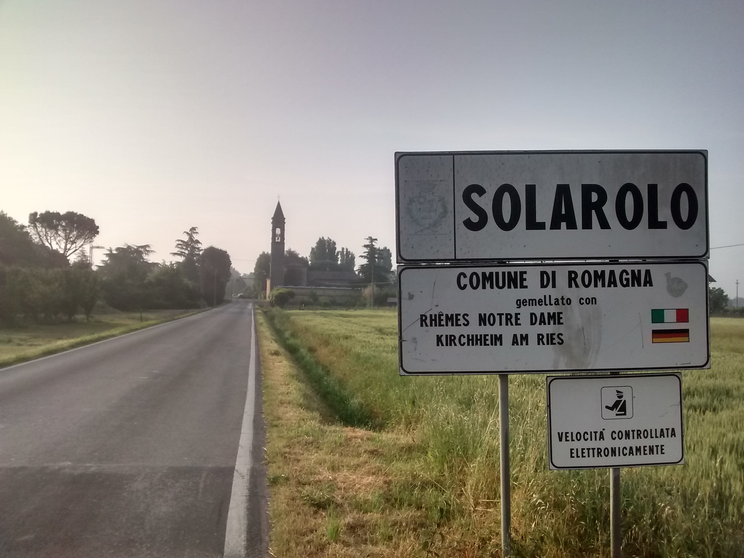 Ingresso del paese